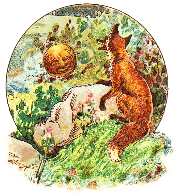 Майстрах Вл. Колобок : [Рус. сказка] — Москва: Е. Коновалова и К°, 1913. — 24 с. : цв. ил.; 21.